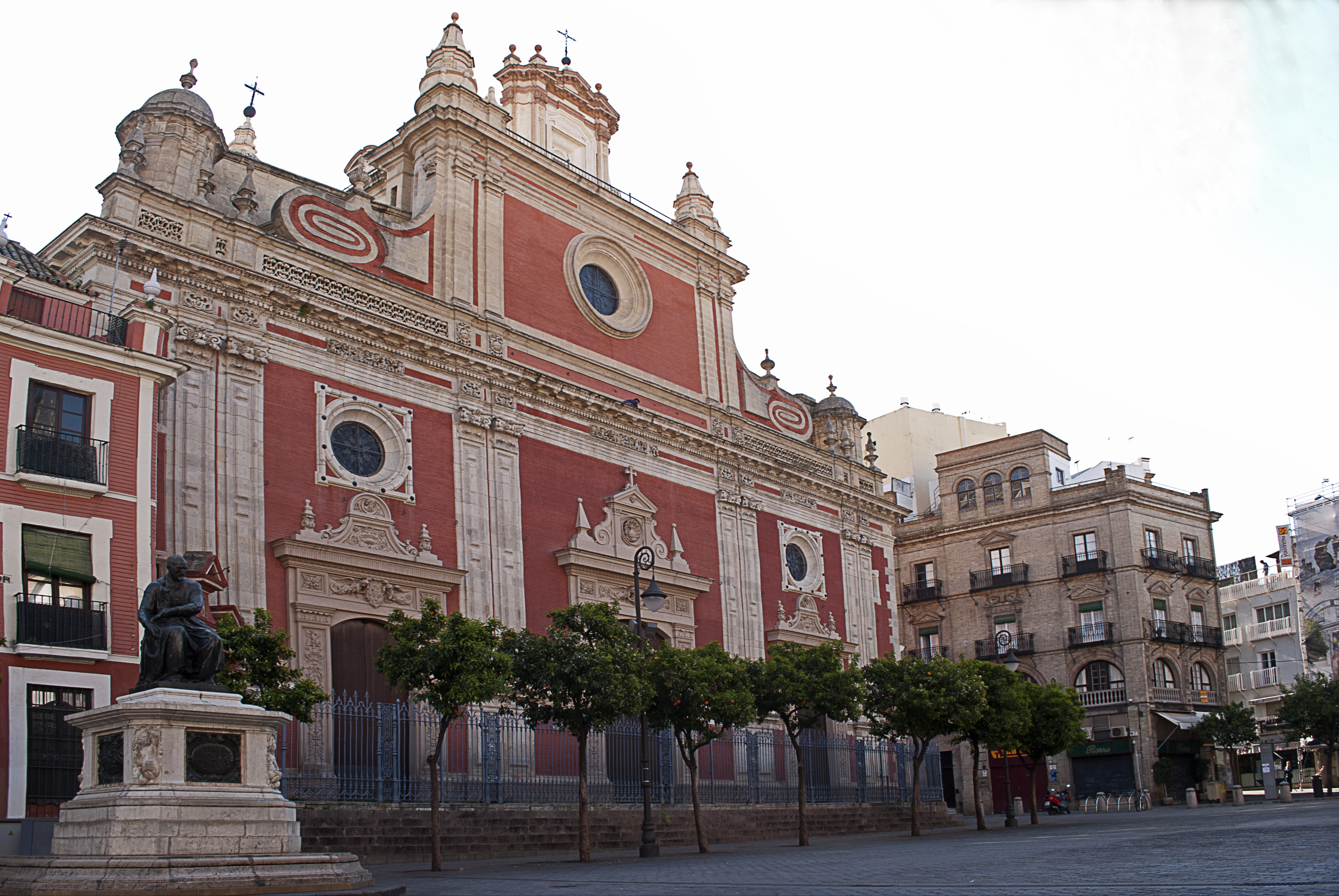 Plaza del Salvador, Sevilla. España